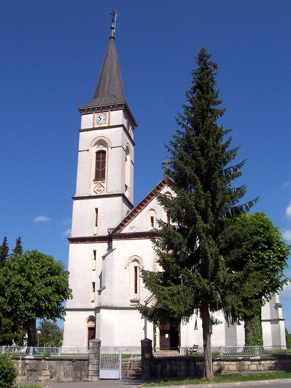 Crkva u Vrbovskom